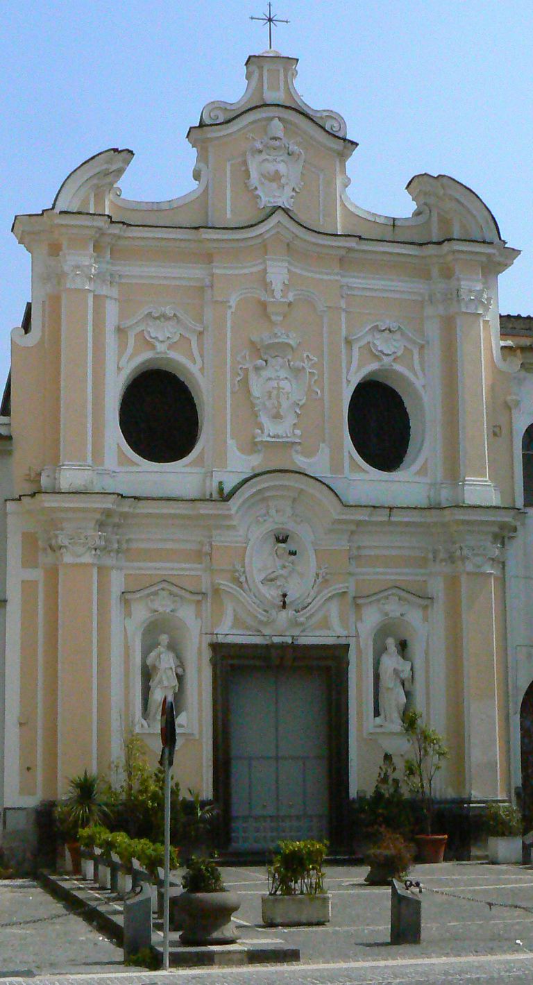 Opera propria